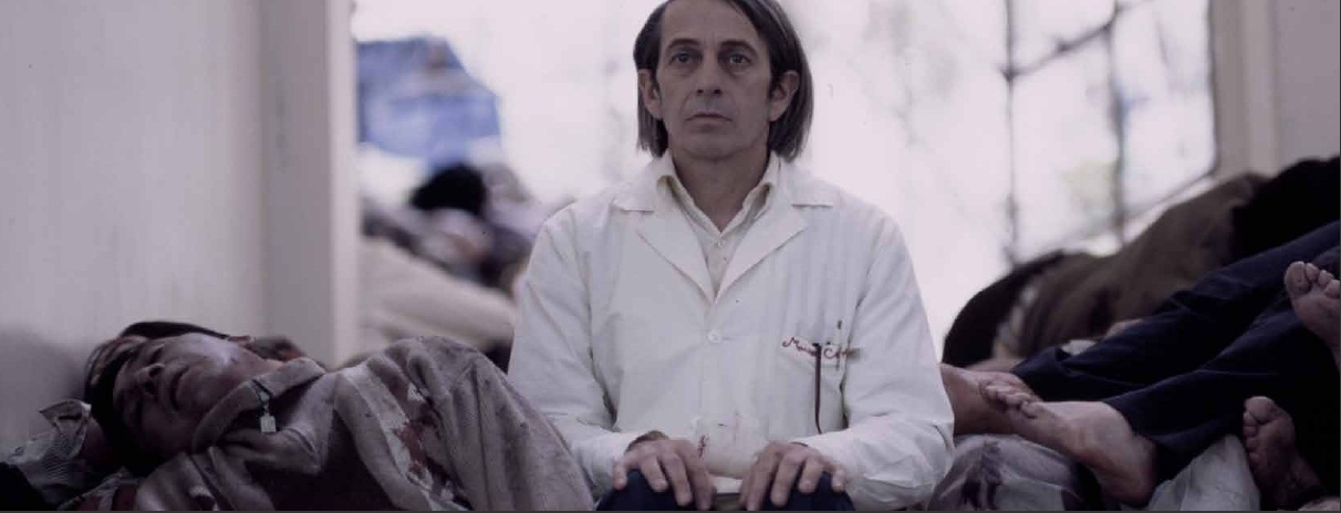 Alfredo Castro en Post Mortem